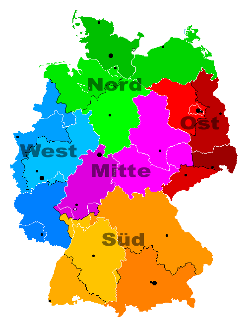 Präsidien und Ämter der Bundespolizei (Deutschland), ehemalige Gliederung. Achtung: Farben nicht nach Farbeinteilung der BPol vergeben!